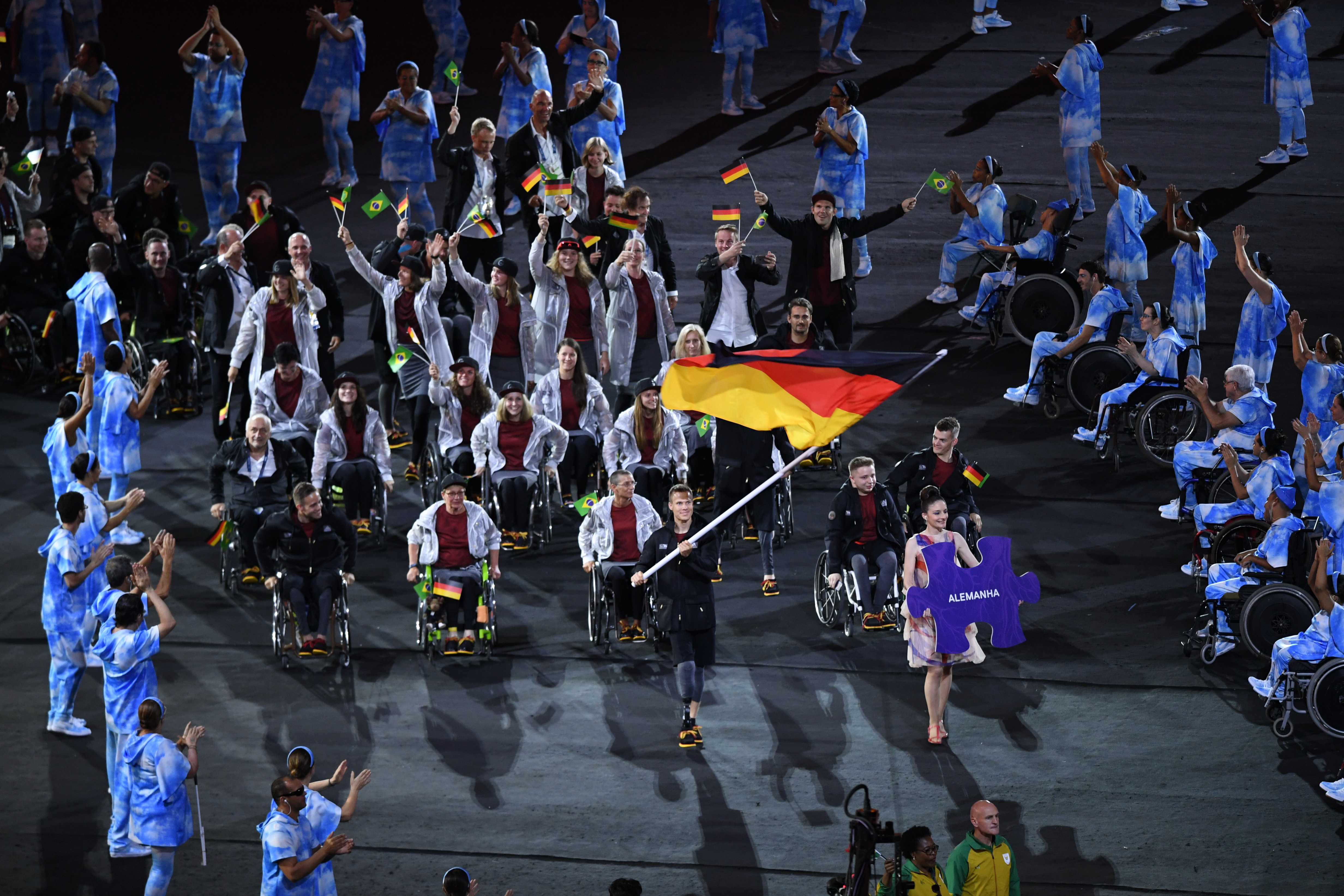 Rio de Janeiro - Cerimônia de abertura dos Jogos Paralímpicos Rio 2016 no Estádio do Maracanã